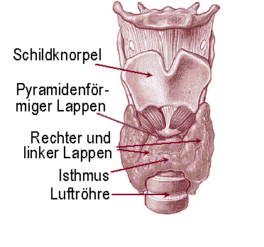 Deutschen Text in "Illu08 thyroid.jpg" eingefügt für Deutsches wiki